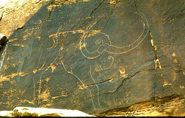 Gravures préhistoriques de la région d'Aflou, Algérie